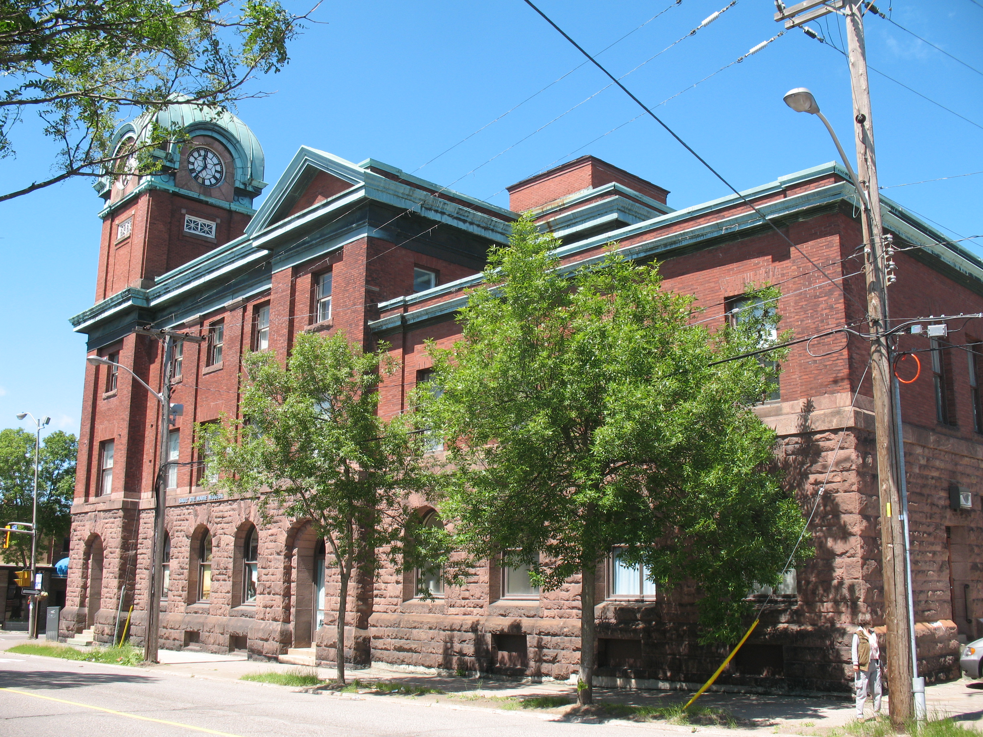 Museum in Sault Ste. Marie im kanadischen Ontario